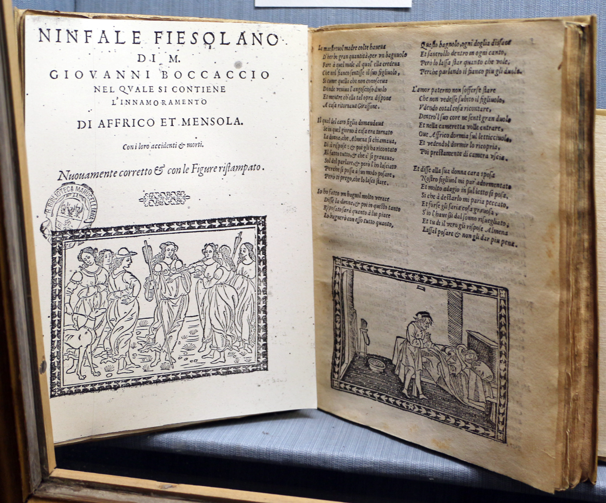 Biblioteca Marucelliana This is a photo of a monument which is part of cultural heritage of Italy.